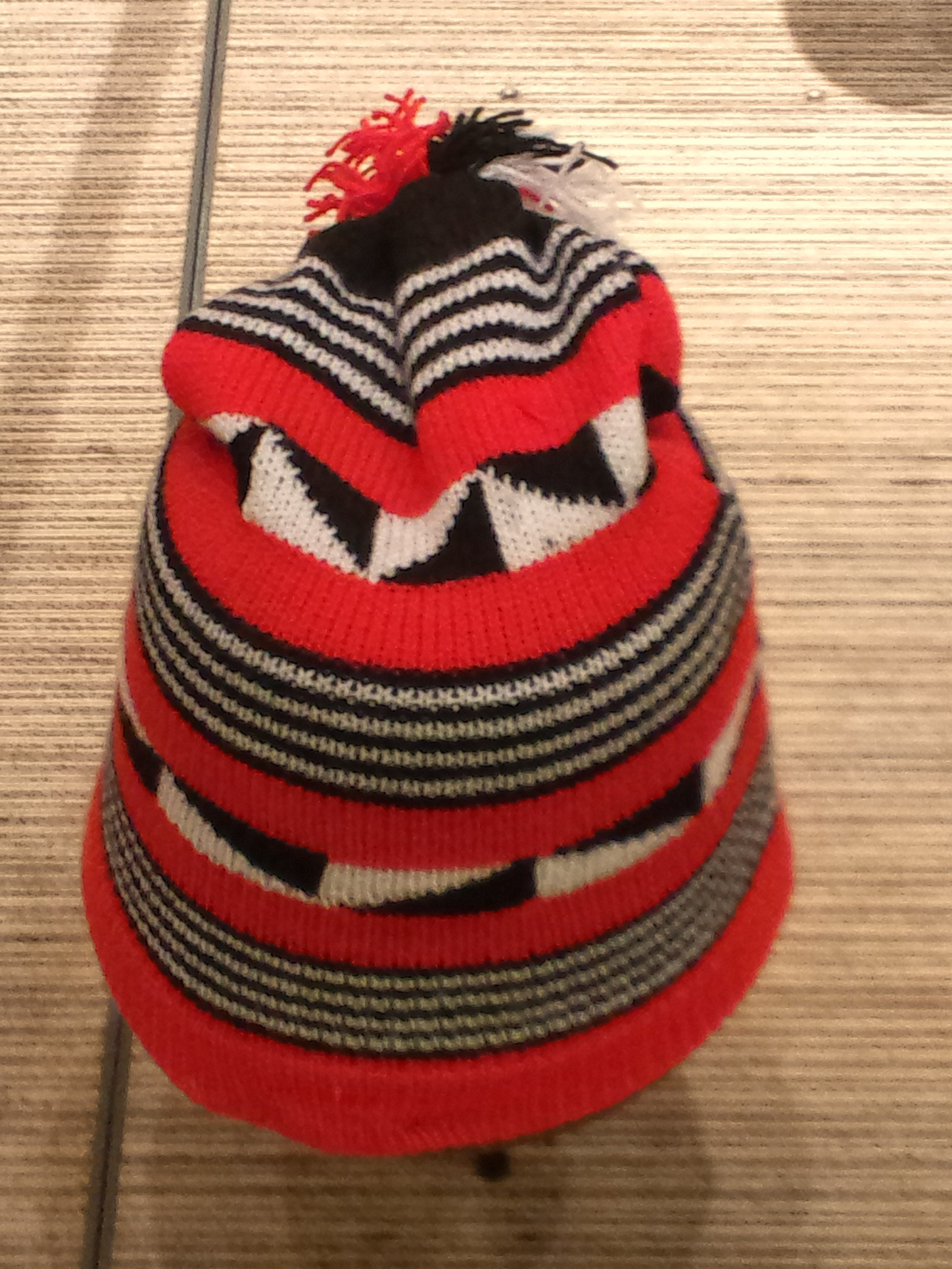 リトルワールド アフリカン・プラザ 臣下用の帽子（ナイジェリア、イボ人、2006年収集）